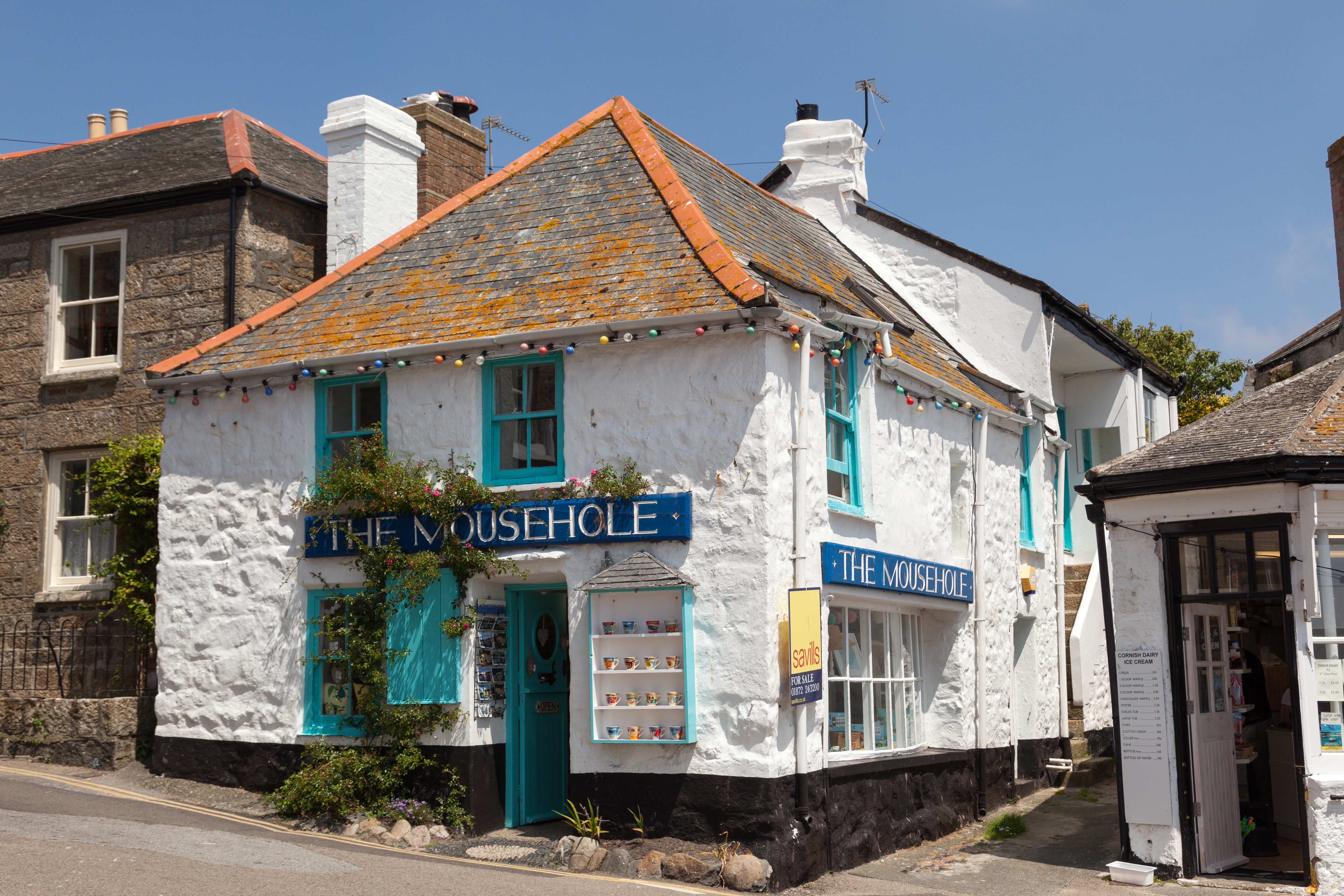 "The Mousehole"